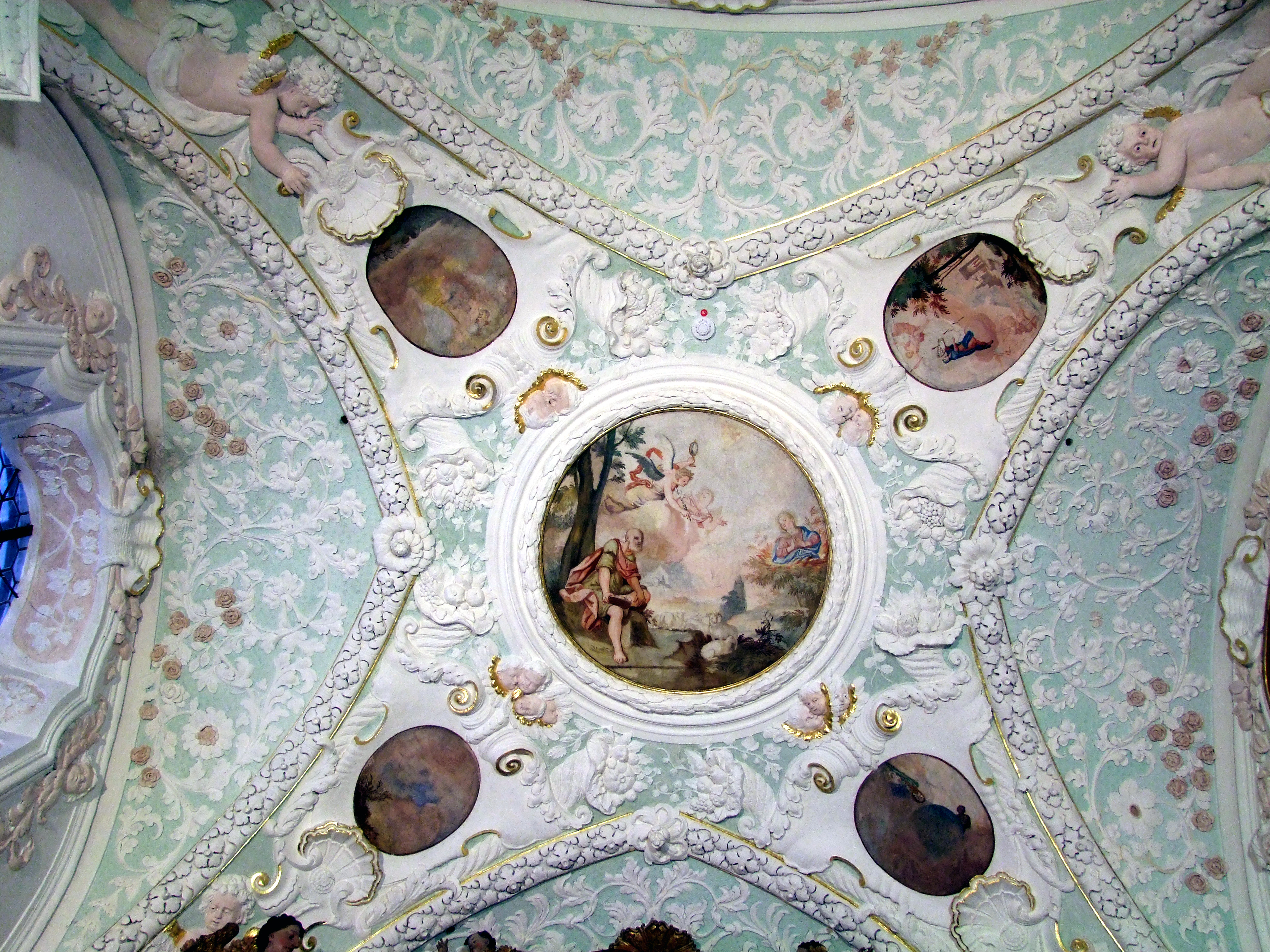 Fresko in der ehemaligen Klosterkirche der Kartause in Buxheim bei Memmingen - OpenStreetMap(Info)